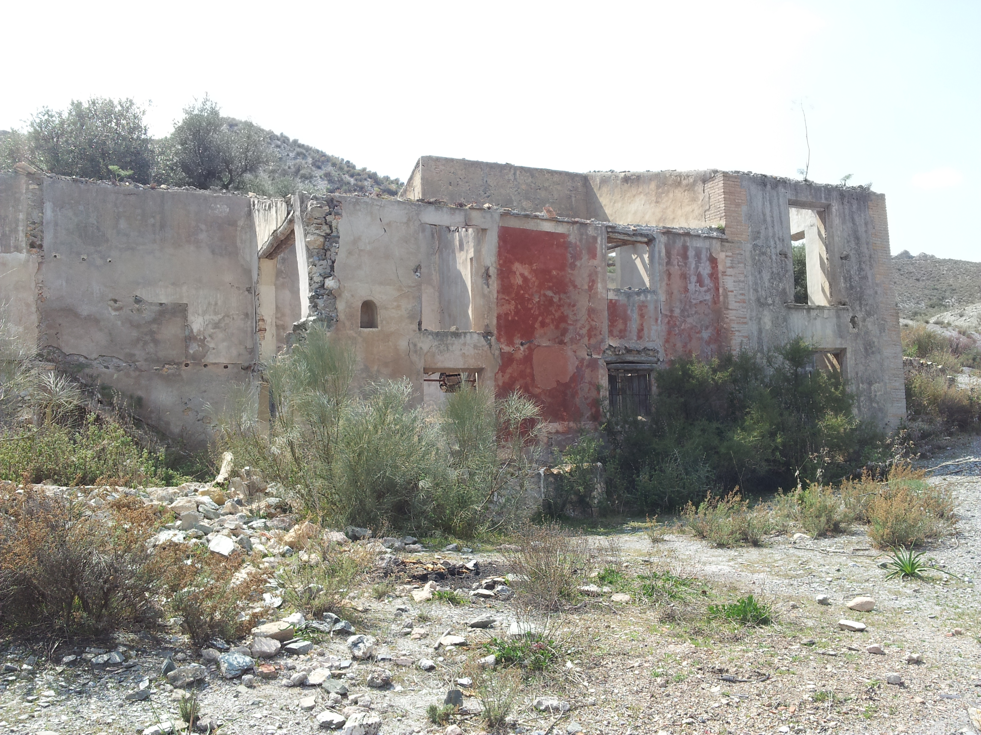 Vista general de la fachada de Molino de Béjar II